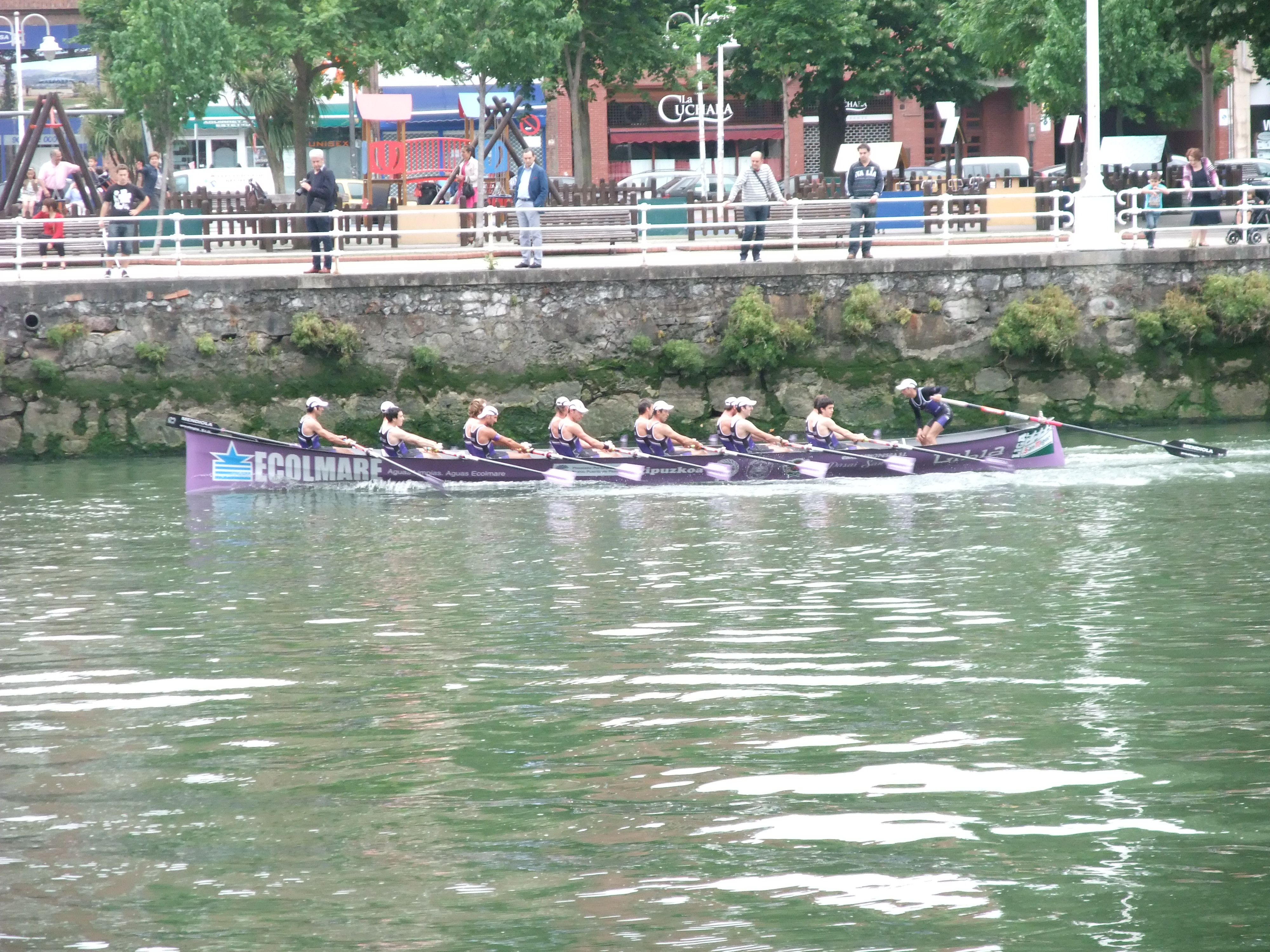 Bilbao (Vizcaya)-Bandera de Bilbao de traineras 2012-2-Pasajes de San Pedro